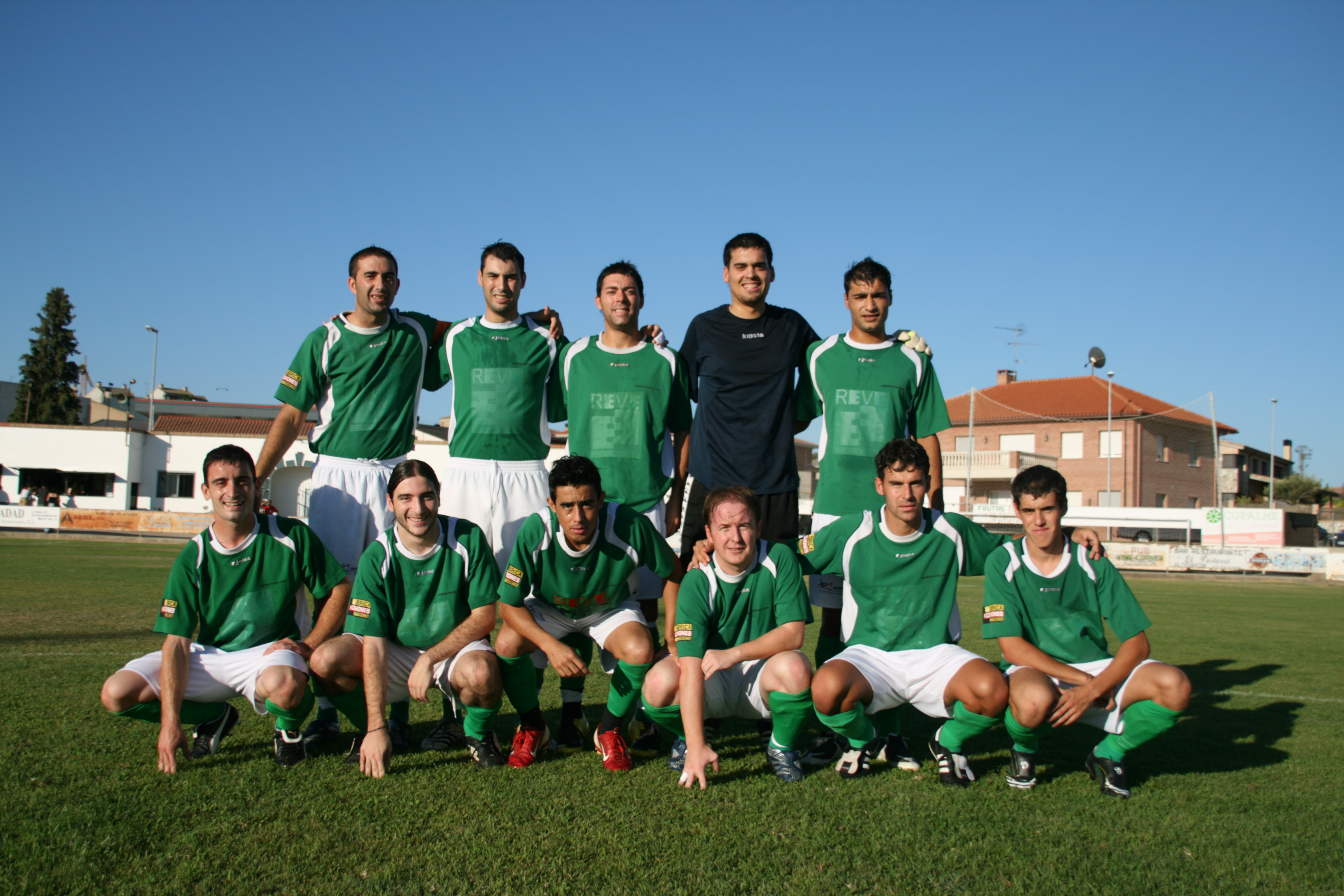 CD Altorricón (Home kit)